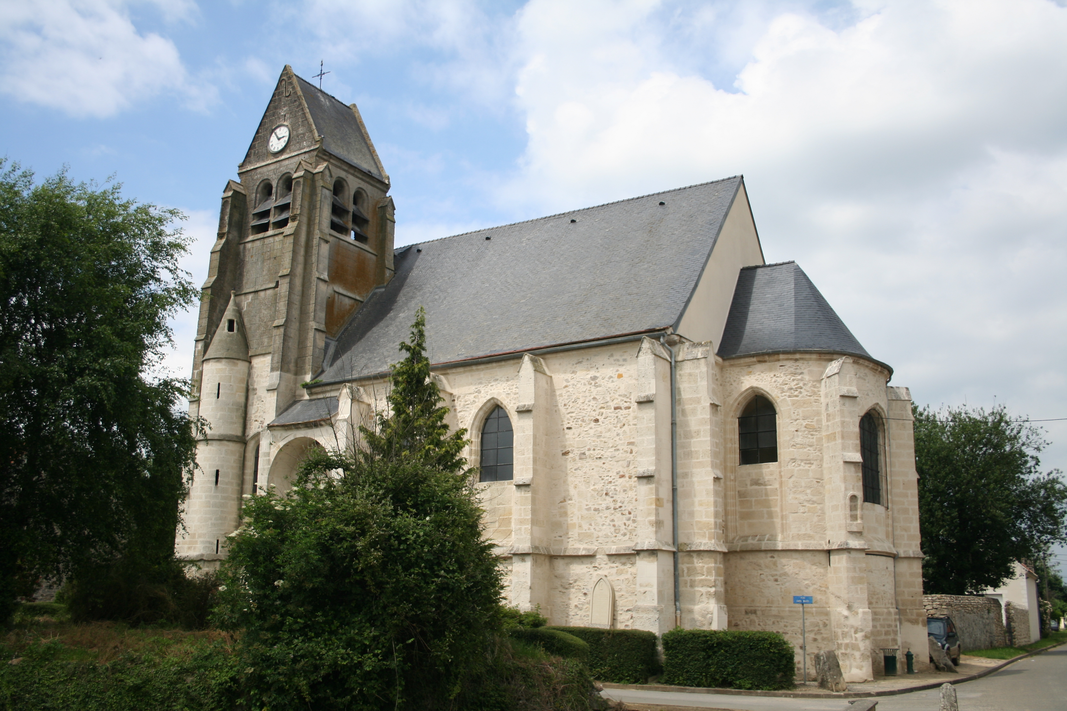 Eglise Saint-Denis-l'Aréopagite 17ème de style roman